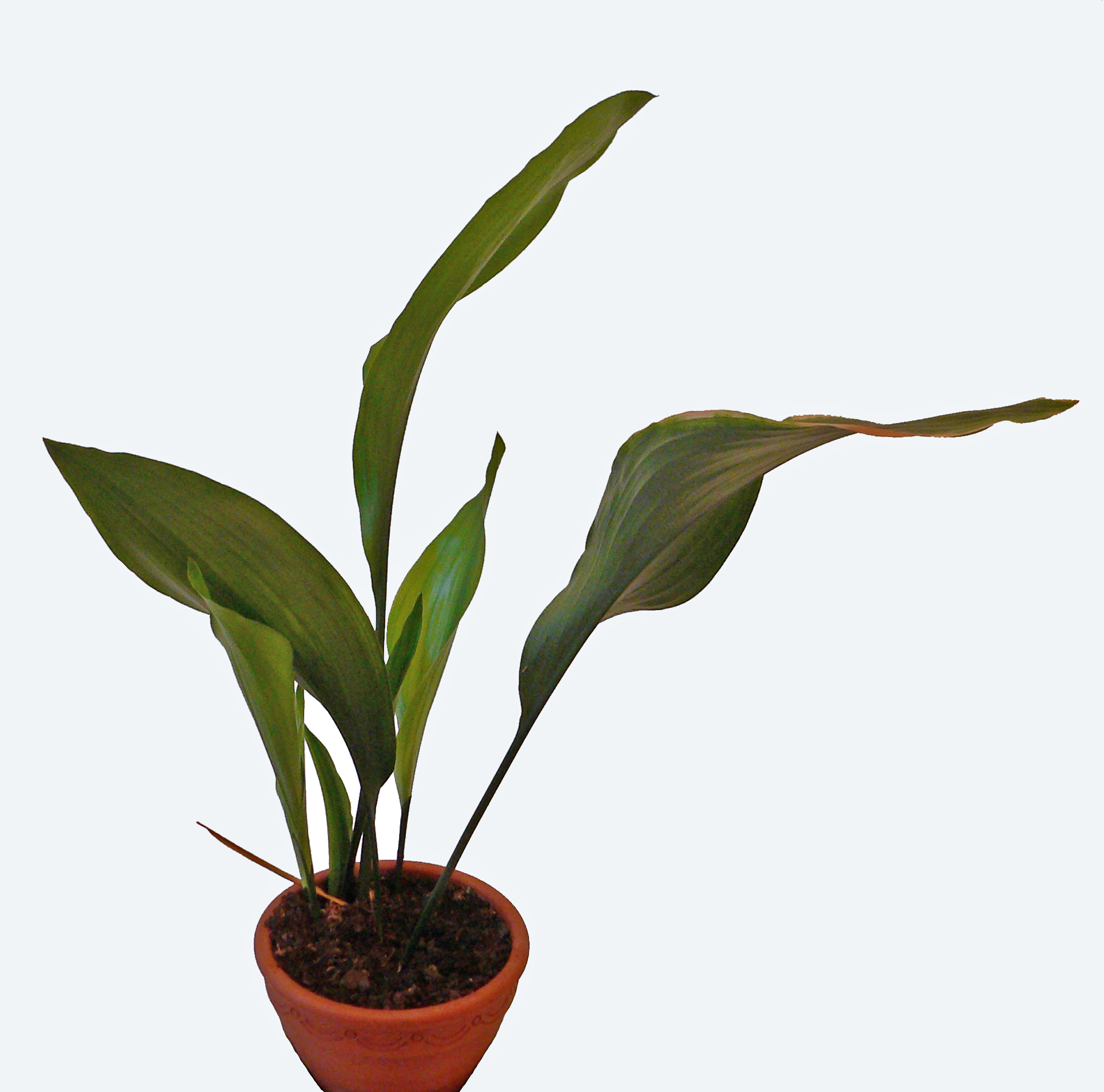 Bildinhalt: Schusterpalme Aufnahmedatum: 19.09.2005 Aufnahmeort: Baden-Baden Die Pflanze ist mit jeglicher Veröffentlichung einverstanden.